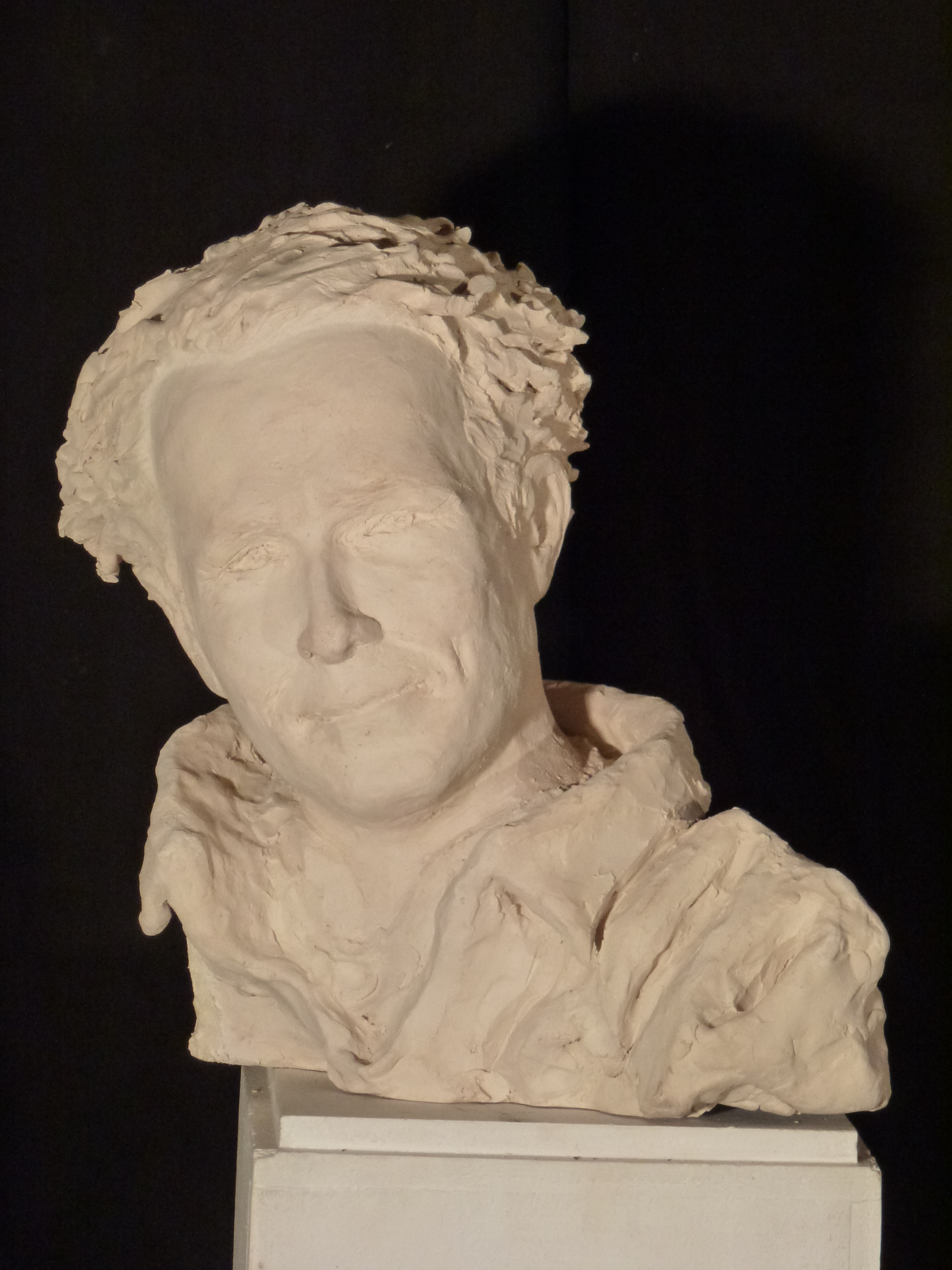 Buste de Jean Mermoz. Sculpture de Délie Duparc. Terre cuite.